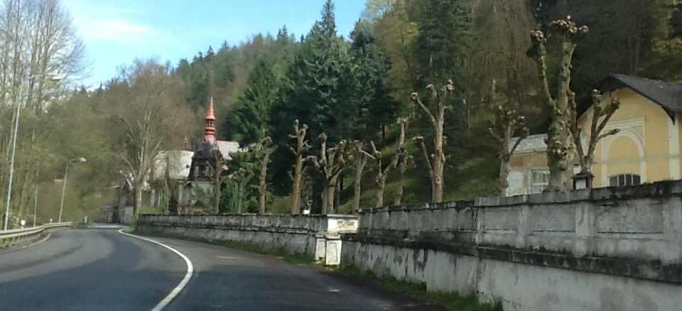 Lipa-Allee (Lazne Kyselka) 2014 2